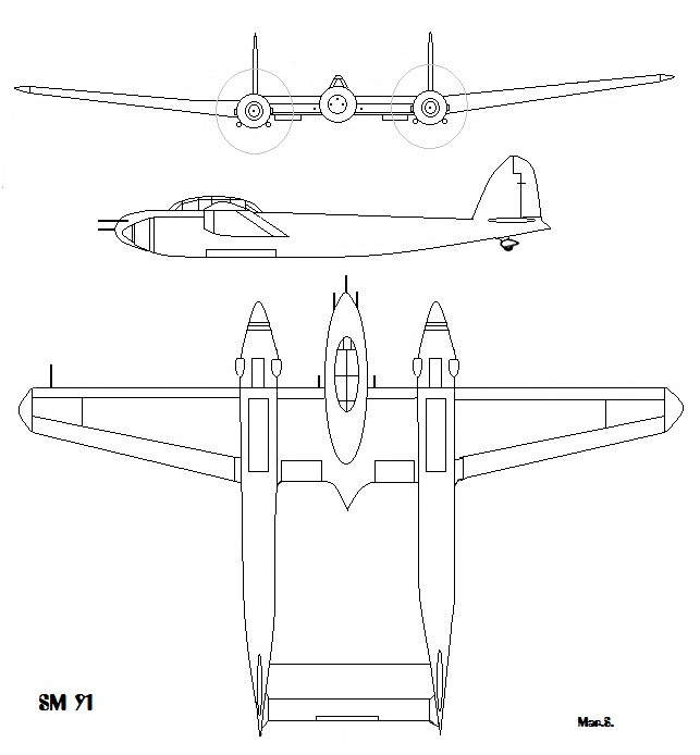 SM 91 Rissziechung